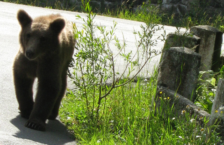 Freilaufender Braunbär, aufgenommen im Juli 2007 in der Nähe von Sinaia